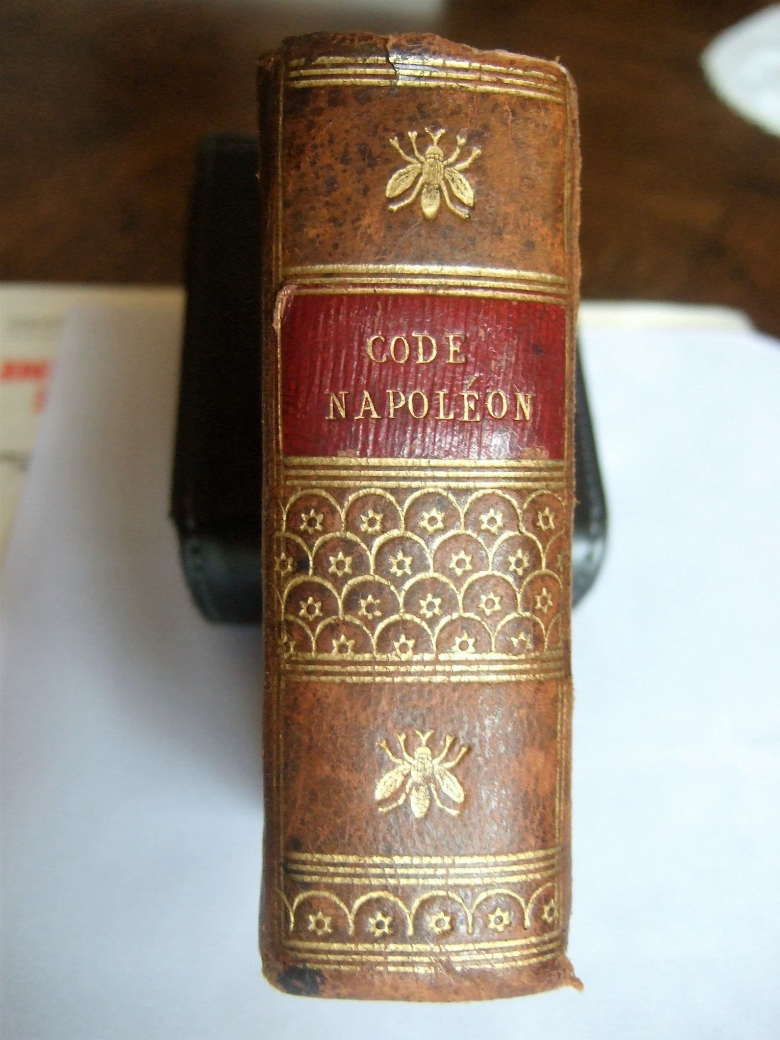 c'est ce livre qui m' lancé sur l'a biographie de cet homme.